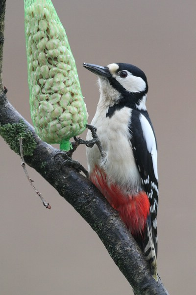 Buntspecht (Dendrocopos major) an der Futterstelle